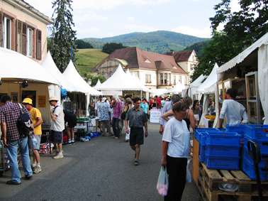 Stands en las calles de Sainte-Marie-aux-Mines